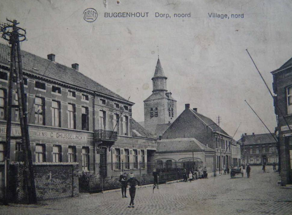 Brouwerhuis Van Damme - Jongensschool C. Ghijsselinckx - kerkstraat - Buggenhout - Oost-Vlaanderen - Vlaanderen - België.